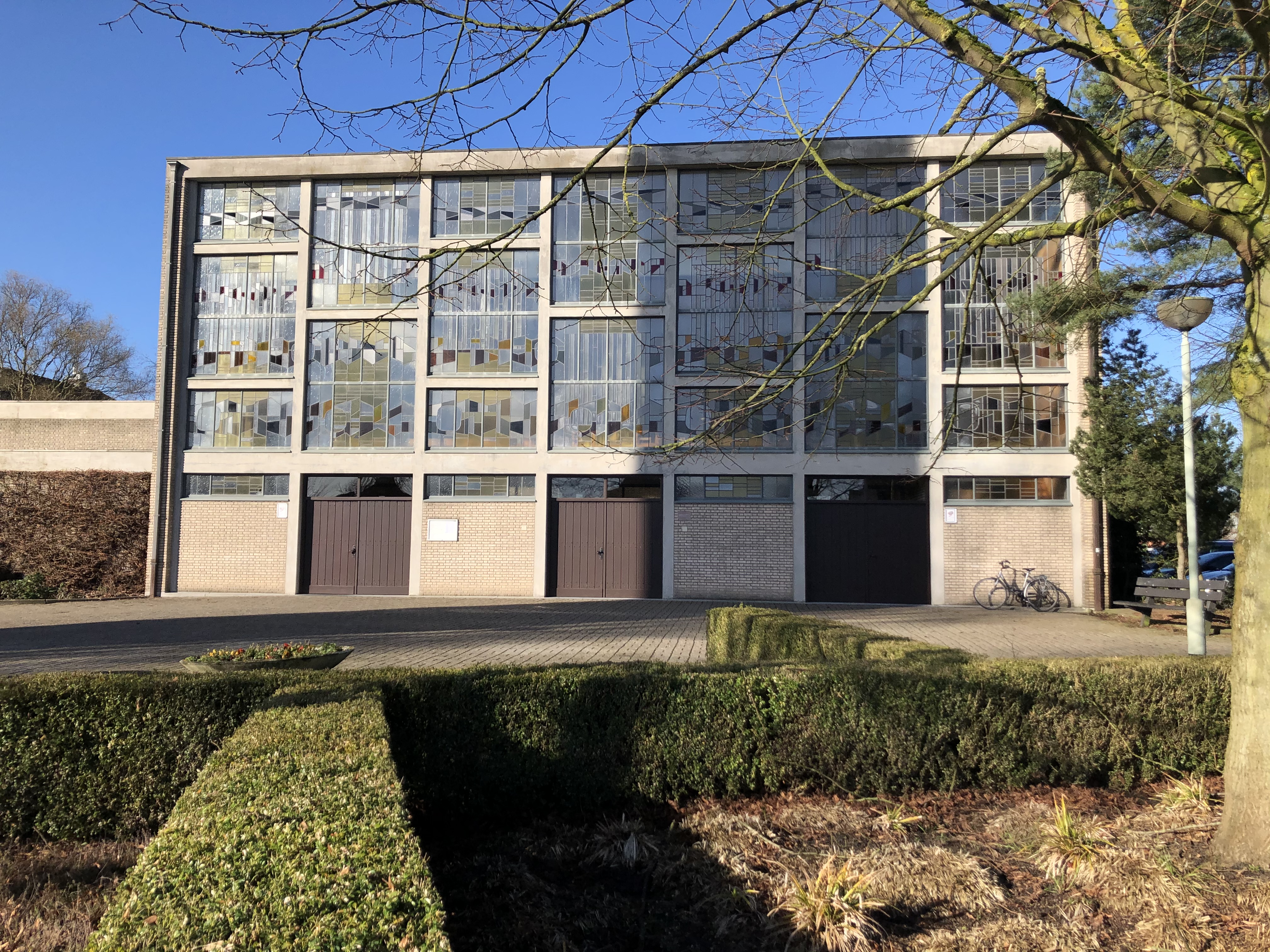 Parochiekerk Onze-Lieve-Vrouw Altijddurende Bijstand